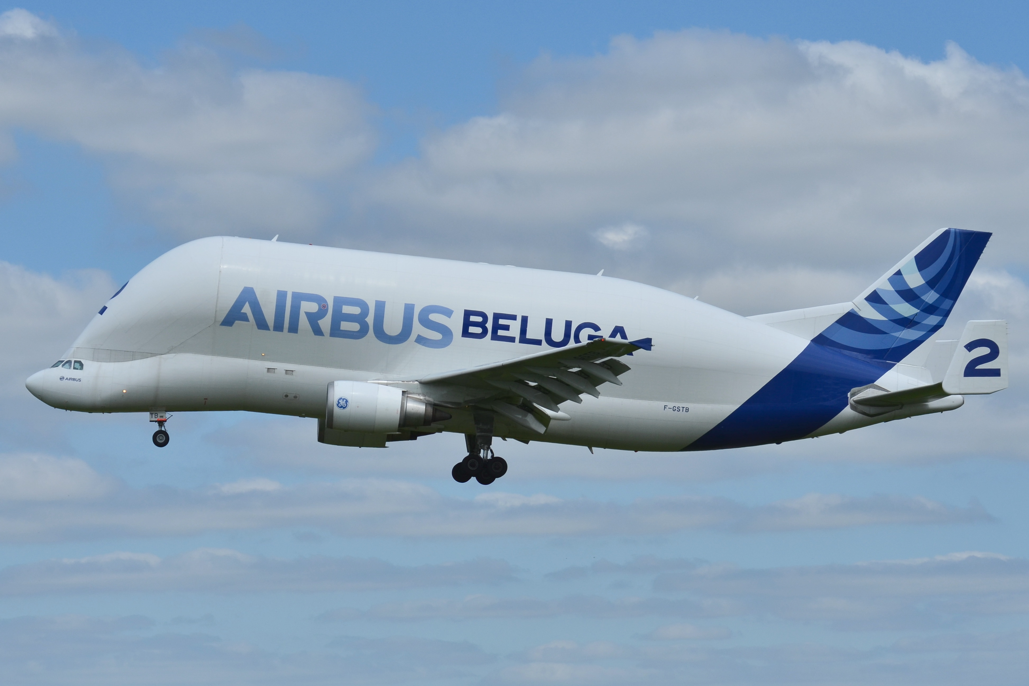 Photo prise à l'aéroport de Toulouse-Blagnac (LFBO) en France. Picture take at Toulouse-Blagnac Airport (LFBO) in France.